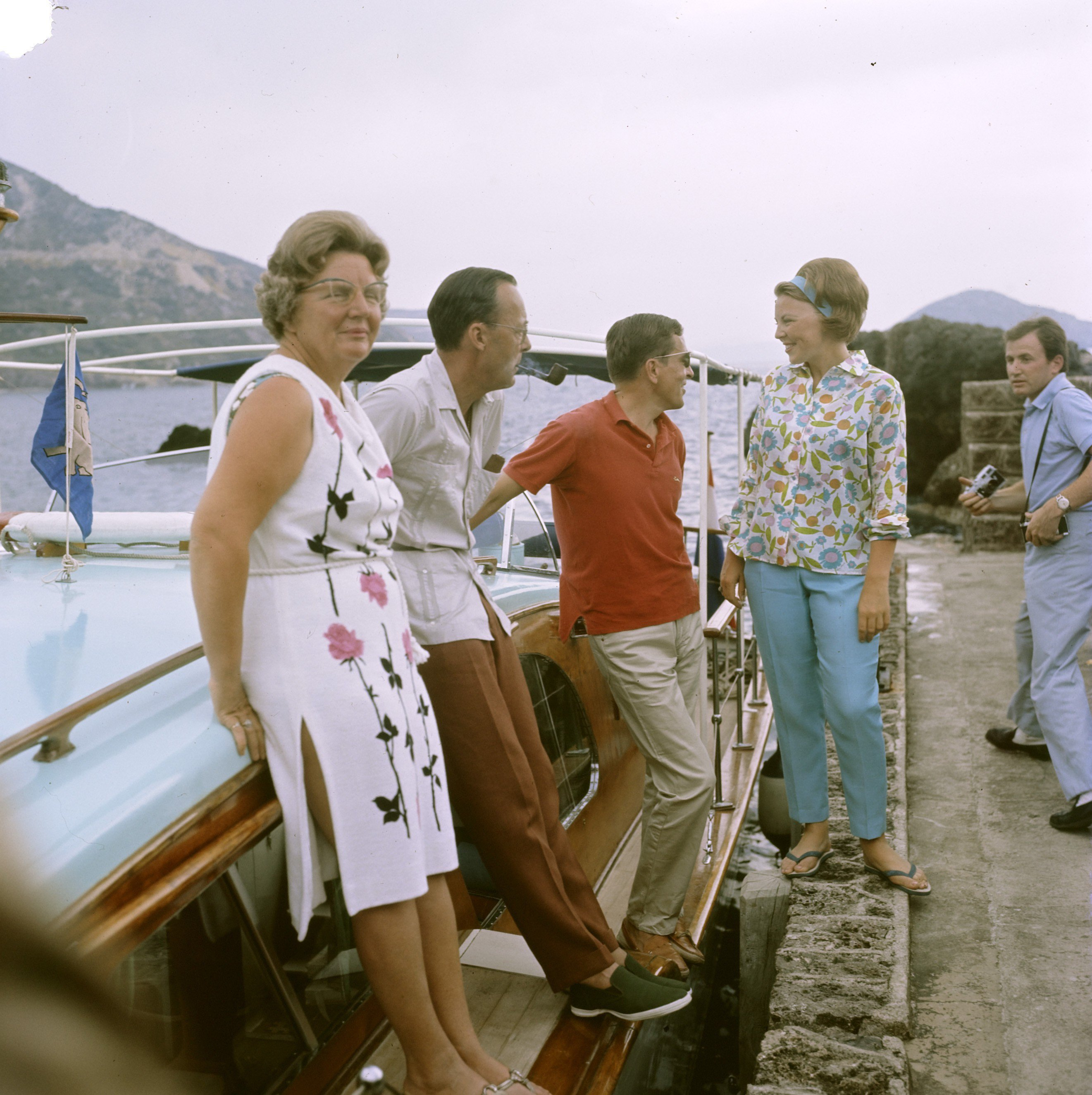 Collectie / Archief : Fotocollectie Anefo Reportage / Serie : De koninklijke familie is op vakantie in Porto Ercole, Italië Beschrijving: v.l.n.r. koningin Juliana, prins Bernhard, jonkheer Claus von Amsberg en kroonprinses Beatrix Datum : 26 juli 1965 Locatie : Italië, Porto Ercole Trefwoorden : koninginnen, prinsen, prinsessen Persoonsnaam : Beatrix, prinses, Bernhard, prins, Claus, jonkheer, Juliana, koningin Instellingsnaam : Villa l'Elefante Felice Fotograaf : Fotograaf Onbekend / Anefo Auteursrechthebbende : Nationaal Archief Materiaalsoort : Dia (kleur) Nummer archiefinventaris : bekijk toegang 2.24.01.07 Bestanddeelnummer : 254-7180